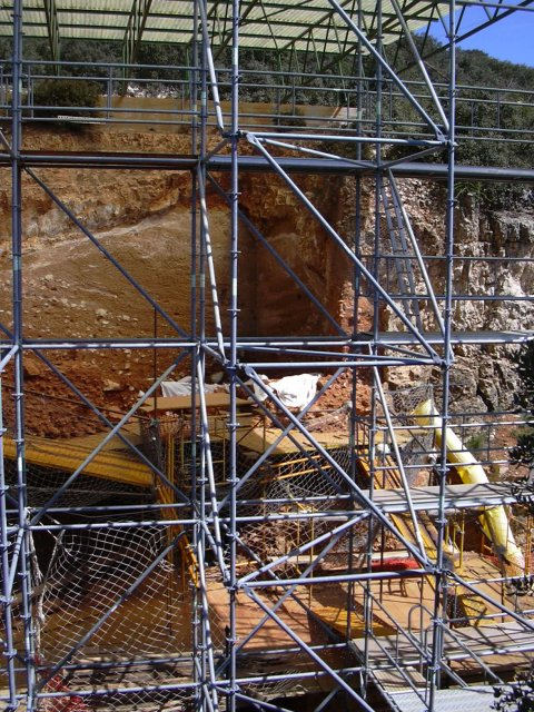 Atapuerca archaelogical dig site, Spain